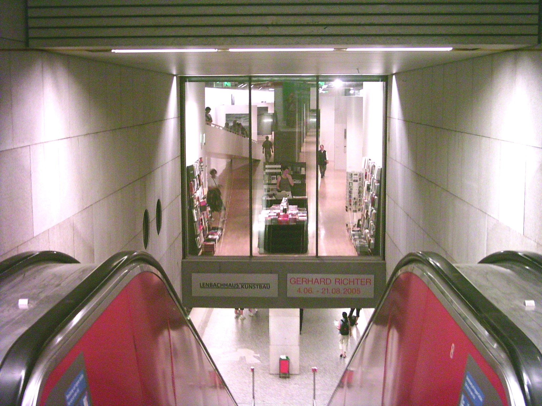 Kunstbau of Lenbachhaus Gallery, München